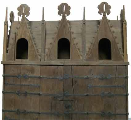 Dreigiebelschrein des Domes zu Brandenburg an der Havel